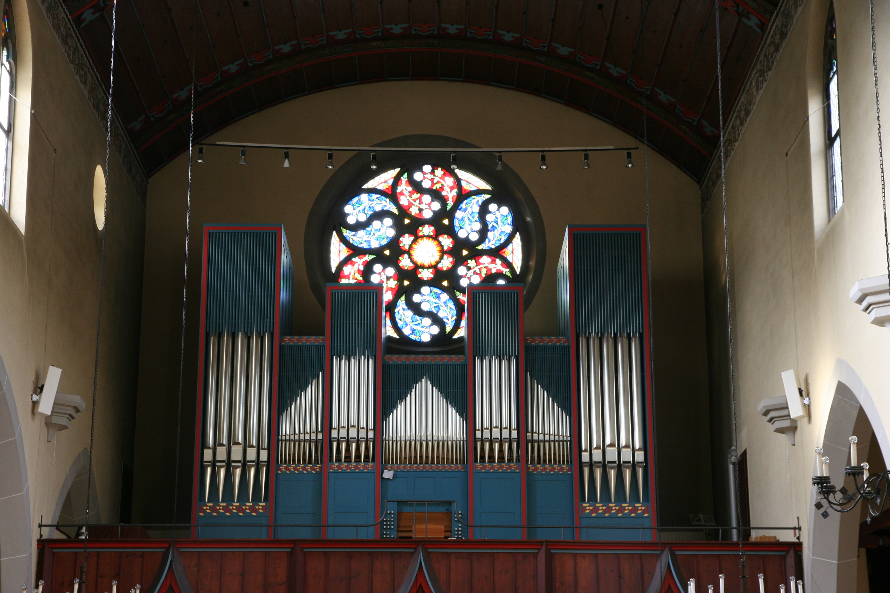 Römisch-katholische Pfarrkirche Hl. Dreifaltigkeit Adliswil, Orgel